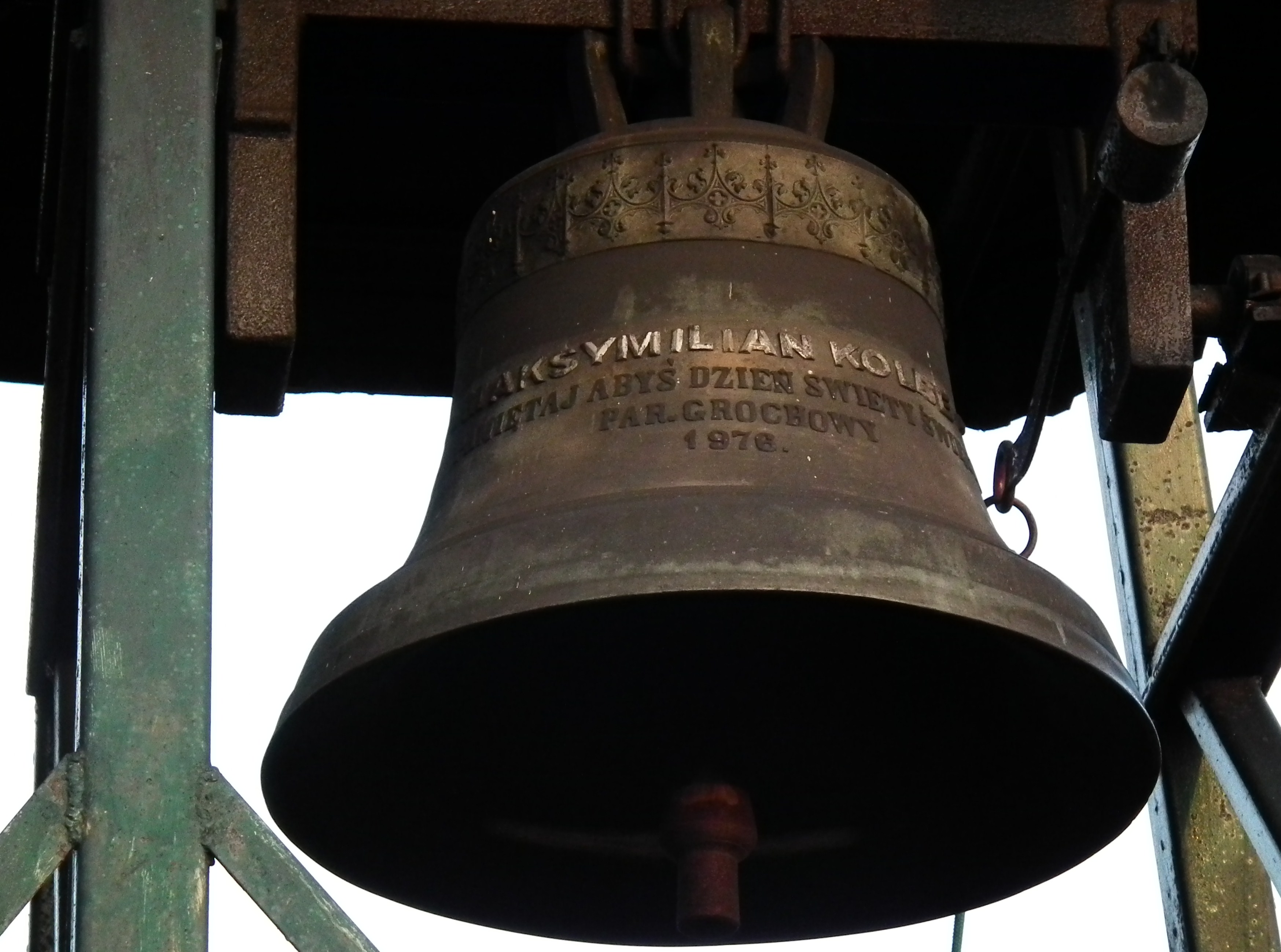 Dzwony kościoła w Grochowach.